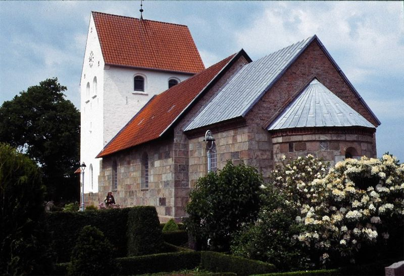 Aidt Kirke set fra sydøst